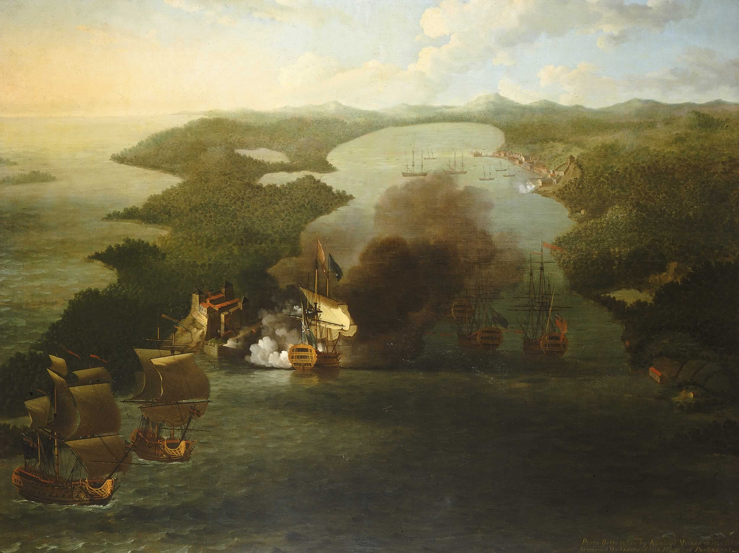 Bombardement des forts de Puerto Bello par la flotte de l'amiral britannique Vernon, 22 novembre 1739.